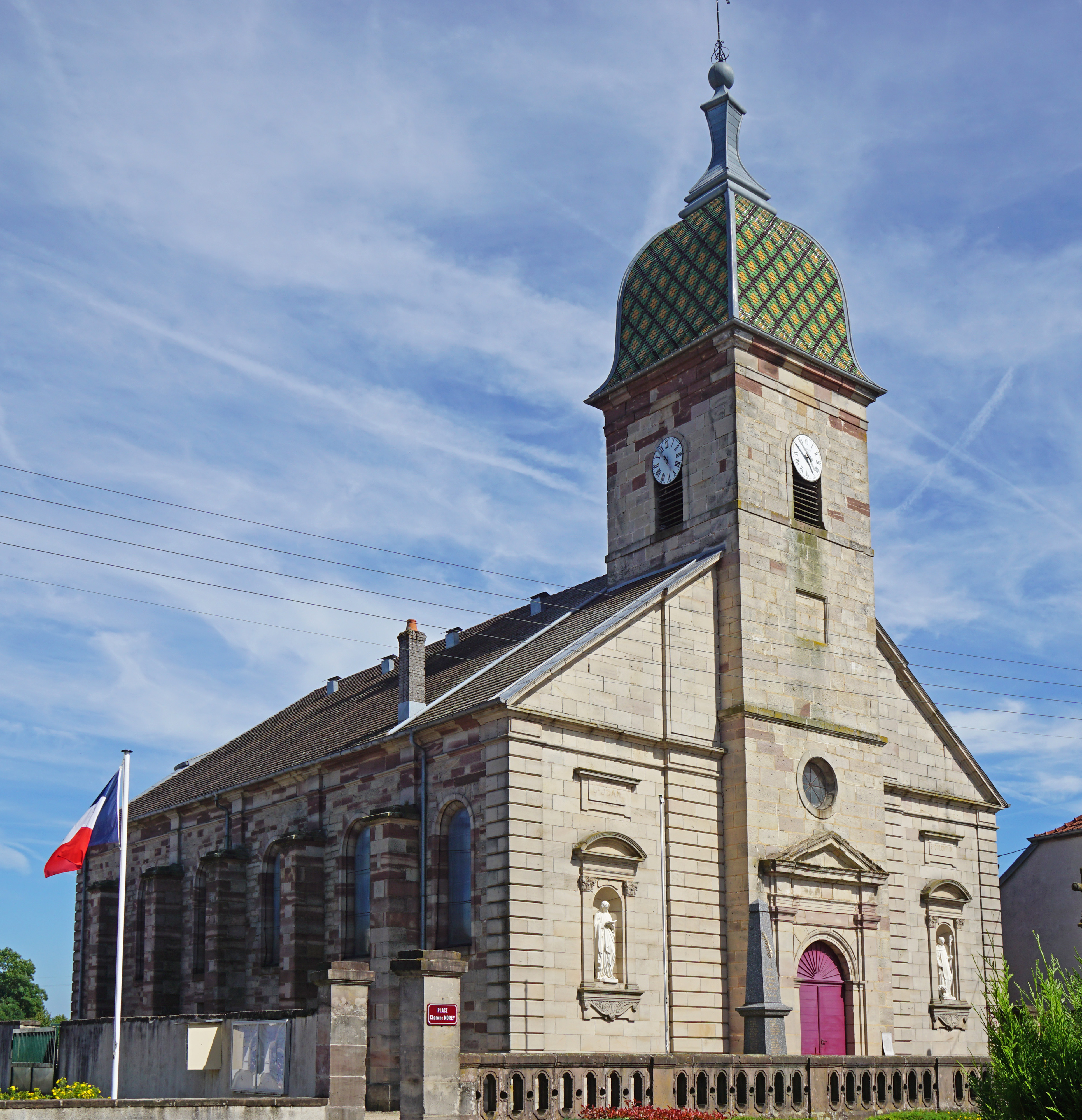 L'église de Baudoncourt.